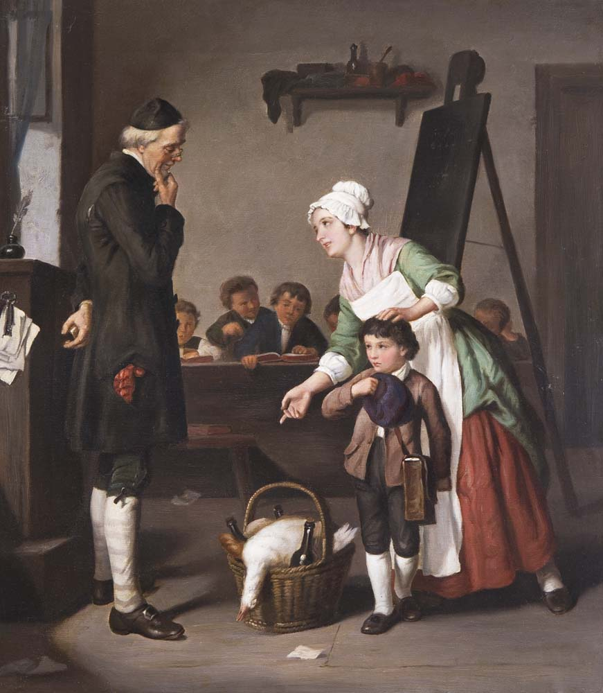 "In der Dorfschule", reumütiger Sünder und dessen Mutter, die den Lehrer mit Essen und Wein verzeihend zu stimmen versucht, Öl auf Leinwand, unsigniert, 56 x 50 cm